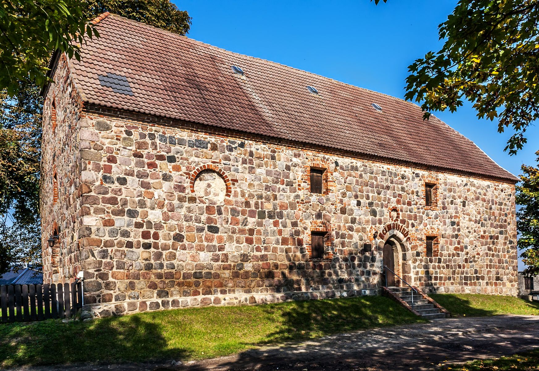 Ehemalige Kirche von Schöneberg, jetzt Heimatstube